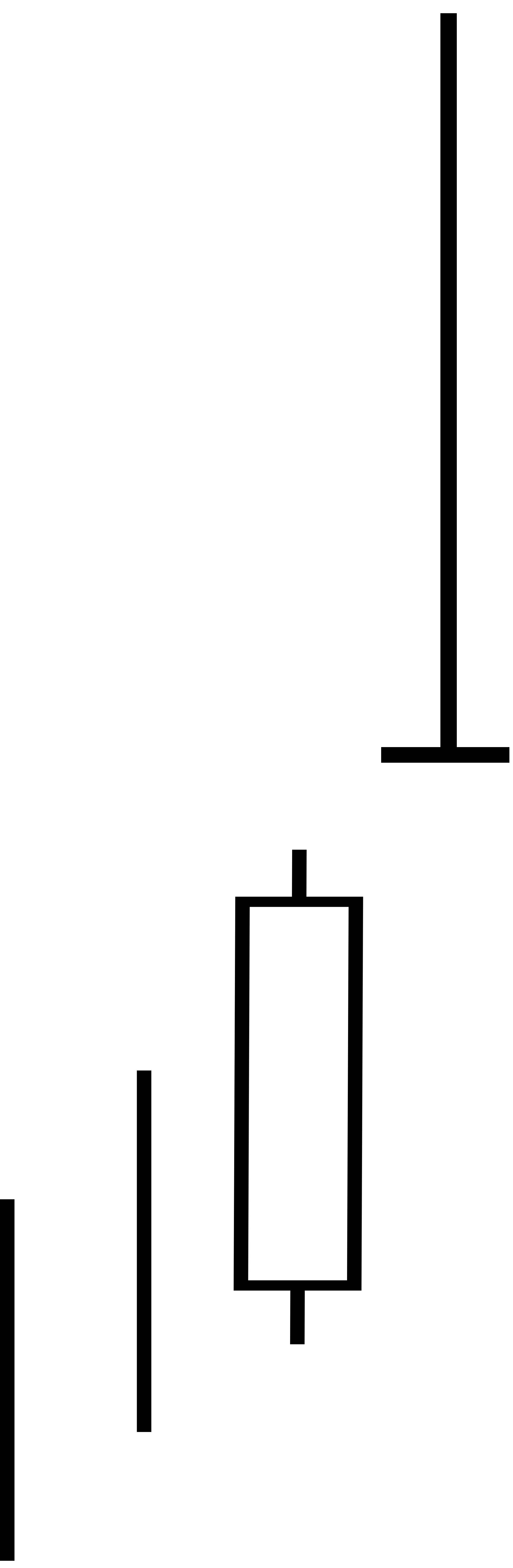 Gravestone